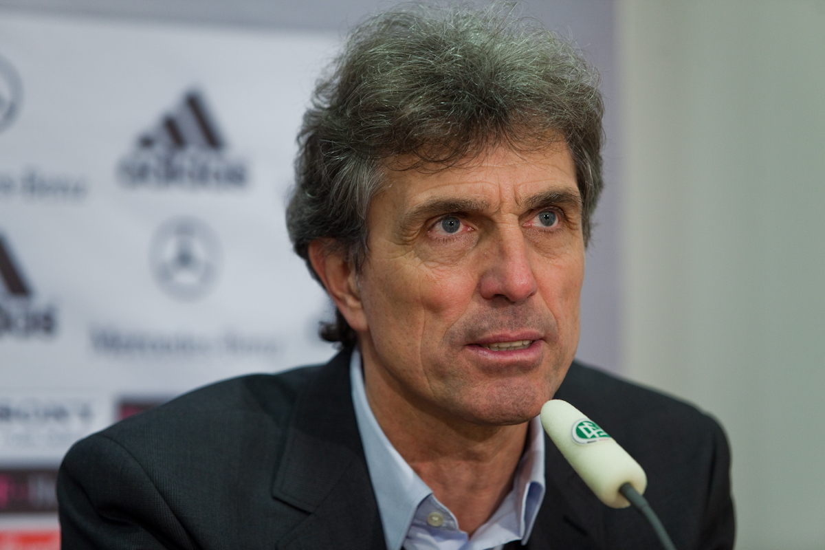 U-21-Nationalmannschaftstrainer Rainer Adrion auf einer Pressekonferenz.